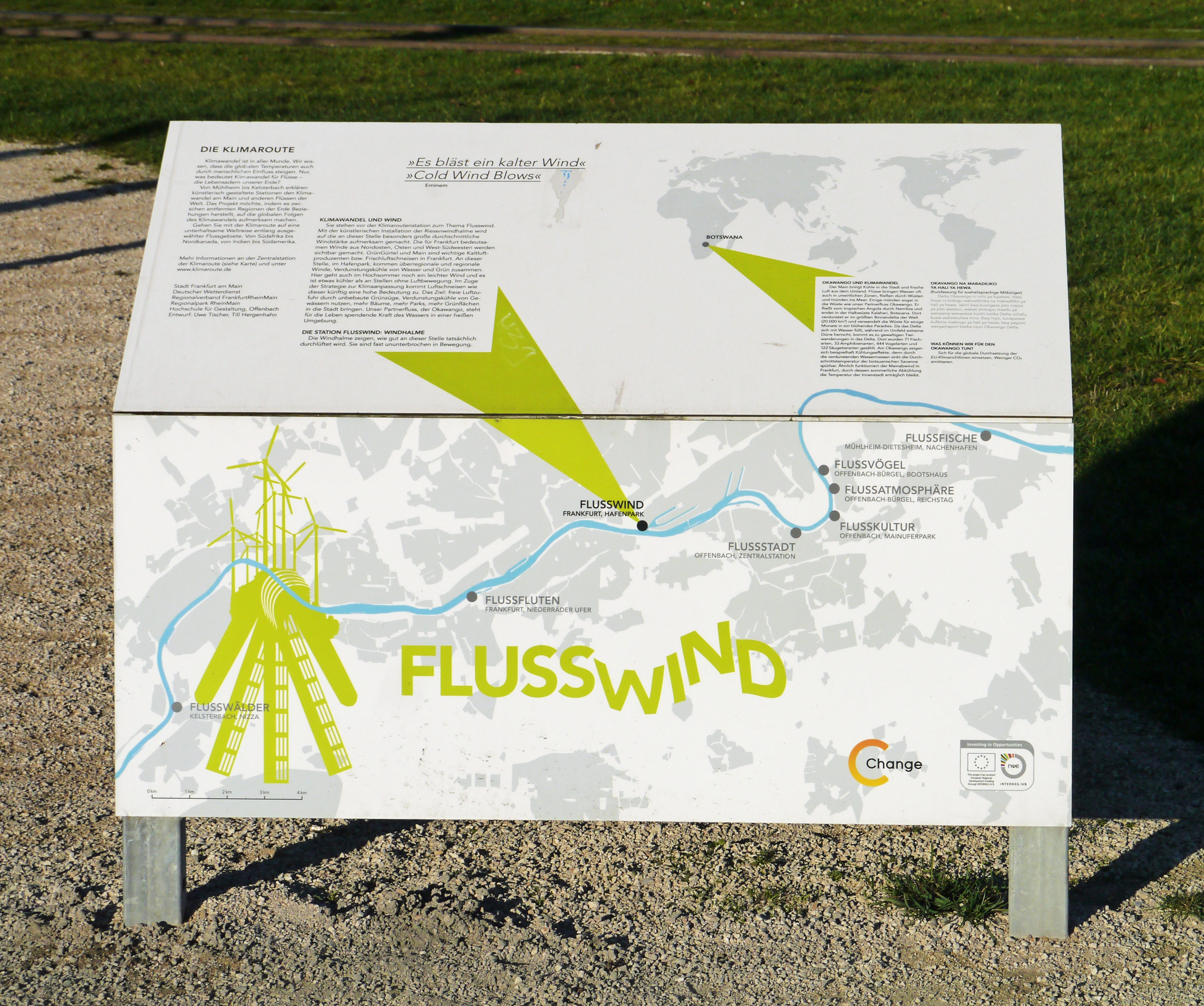 Die Station Flusswind des Regionalpark Rhein-Main und seinem überregionalem Mainuferprojekt Klimaroute, von Kelsterbach bis Mühlheim im Hafenpark am Mainufer in Frankfurt.